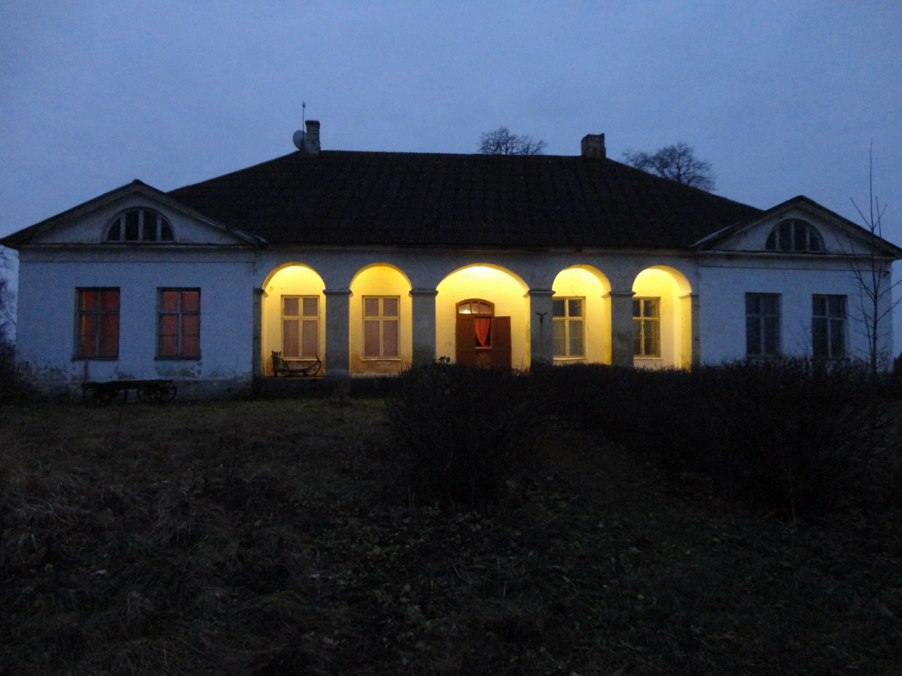 Postijaam eest